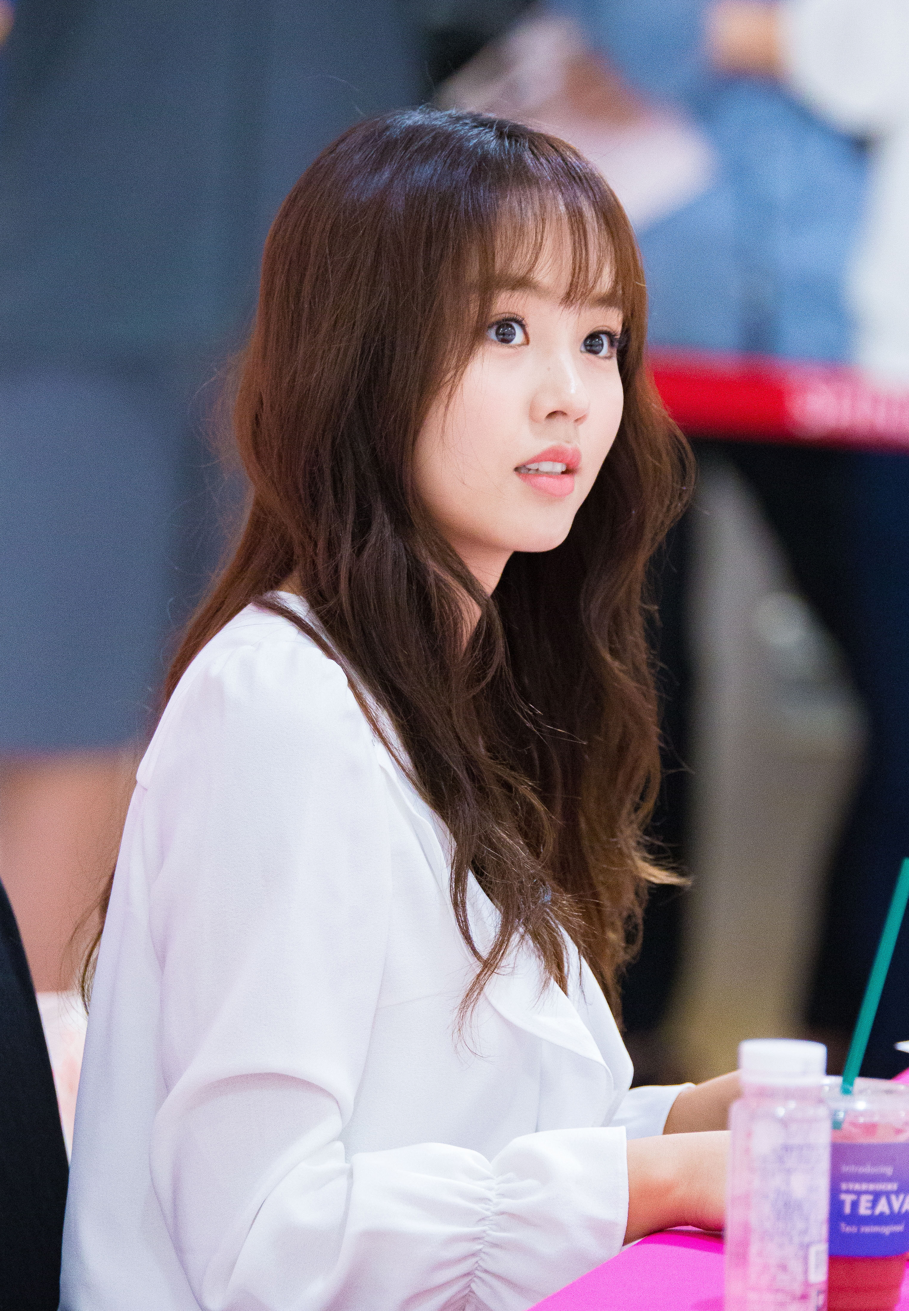 20160924 김소현 숲 팬싸인회